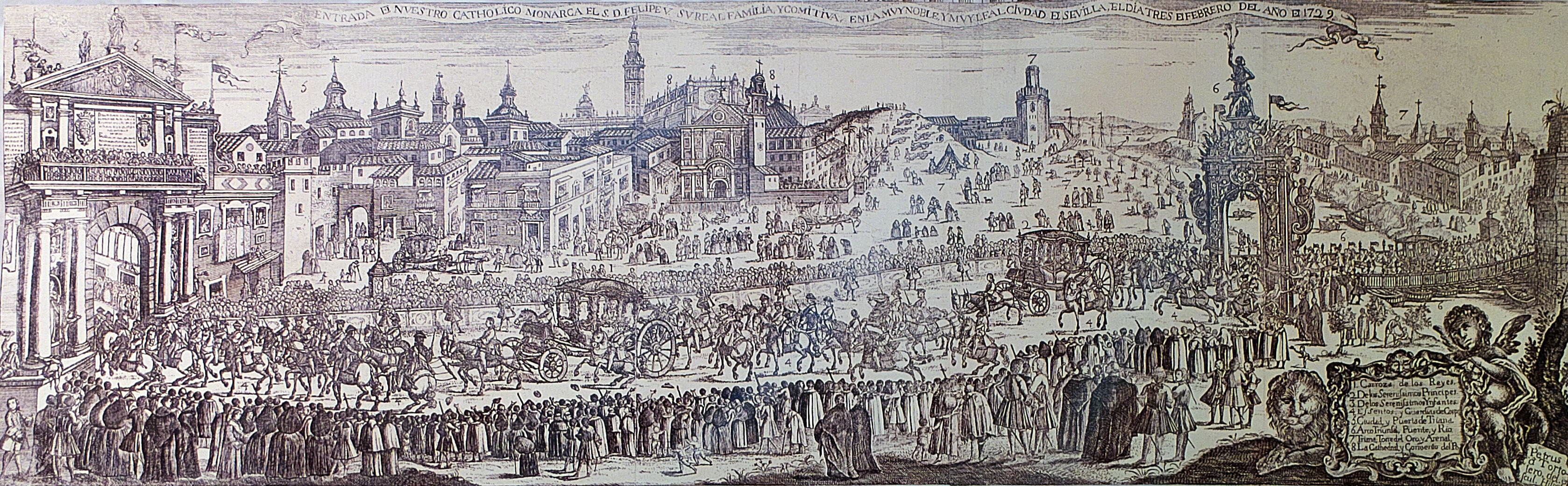 Petrus Tortolero realiza un grabado (ca. 1738) con la triunfal entrada de Felipe V en Sevilla.